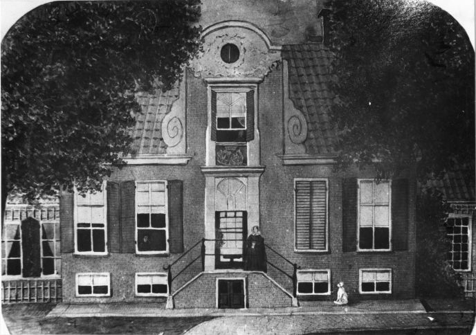 buitenplaats Veenhuizen in Noordbroek van de familie Gockinga, afgebroken in 1851/1853